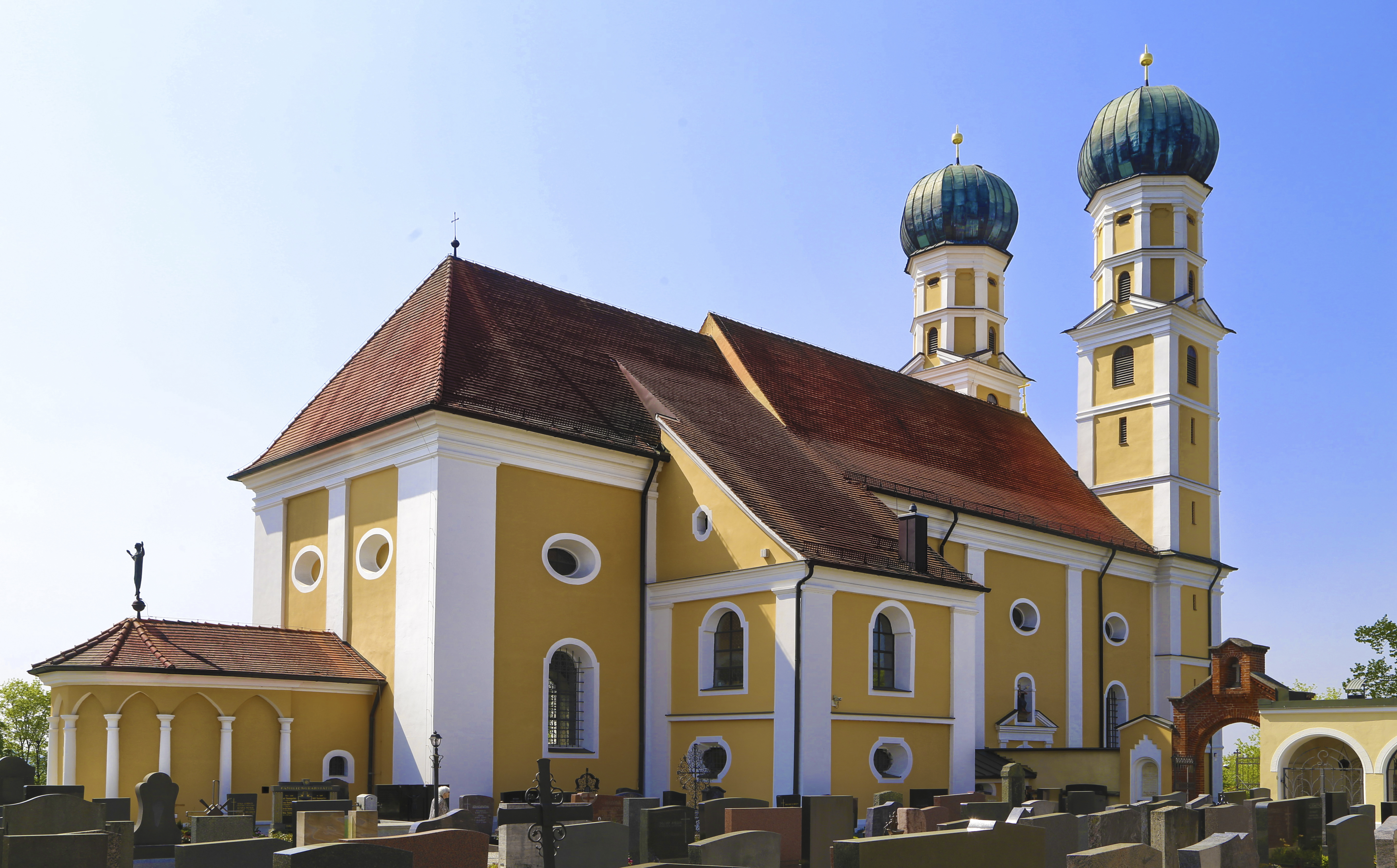 Gartlberg, Pfarrkirchen; Katholische Wallfahrtskirche, Barockbau mit Doppelturmfassade und Hl. Grab-Kapelle im Osten des Chores, 1669–1688 nach Plänen von Domenico Zuccalli erbaut, Fertigstellung um 1715 u. a. durch Giovanni Battista Carlone und Paolo Allio; mit Ausstattung